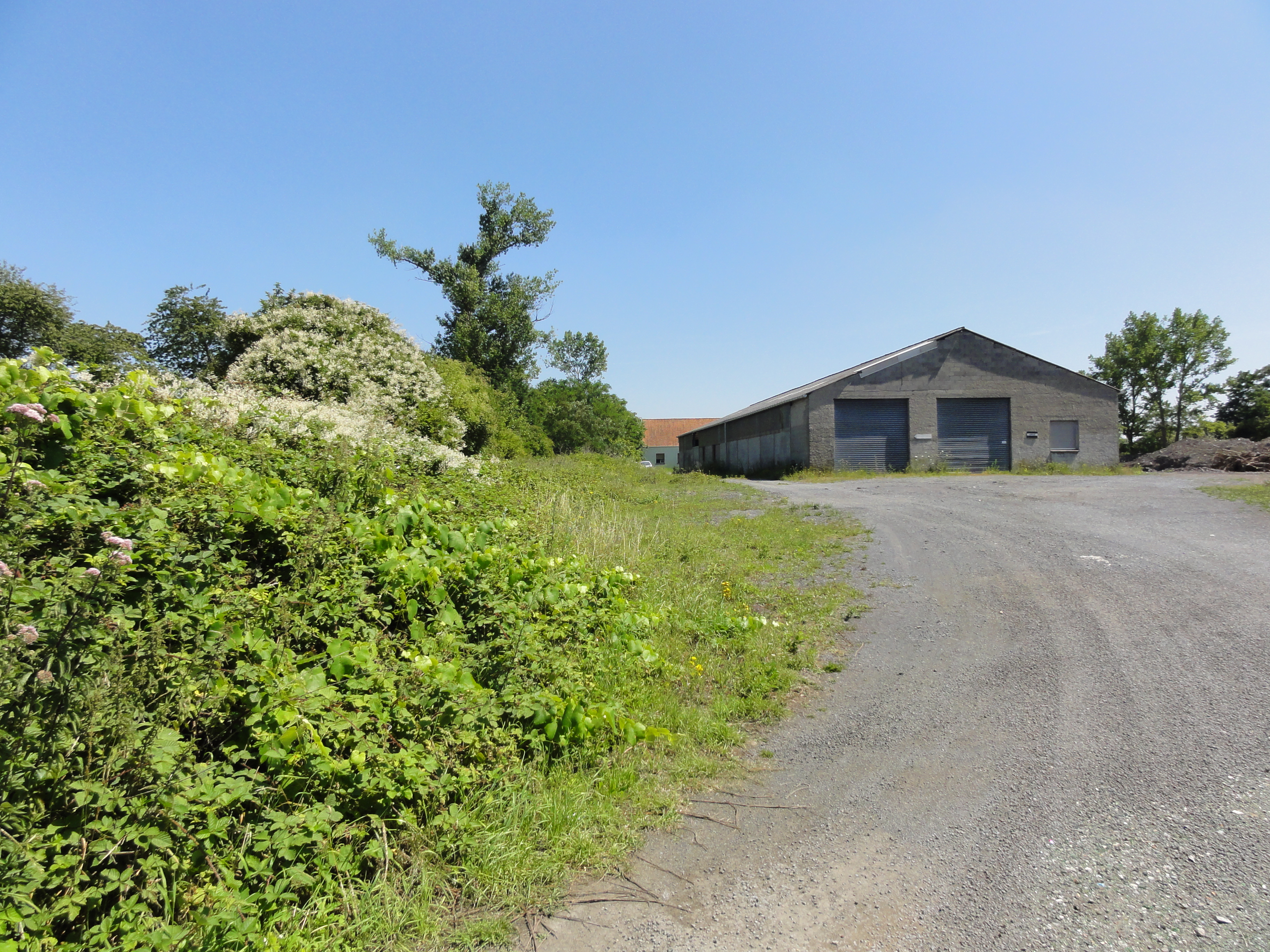 Terril n° 187 dit Davy Sud, disparu, Fosse Davy de la Compagnie des mines d'Anzin, La Sentinelle, Nord, Nord-Pas-de-Calais, France.